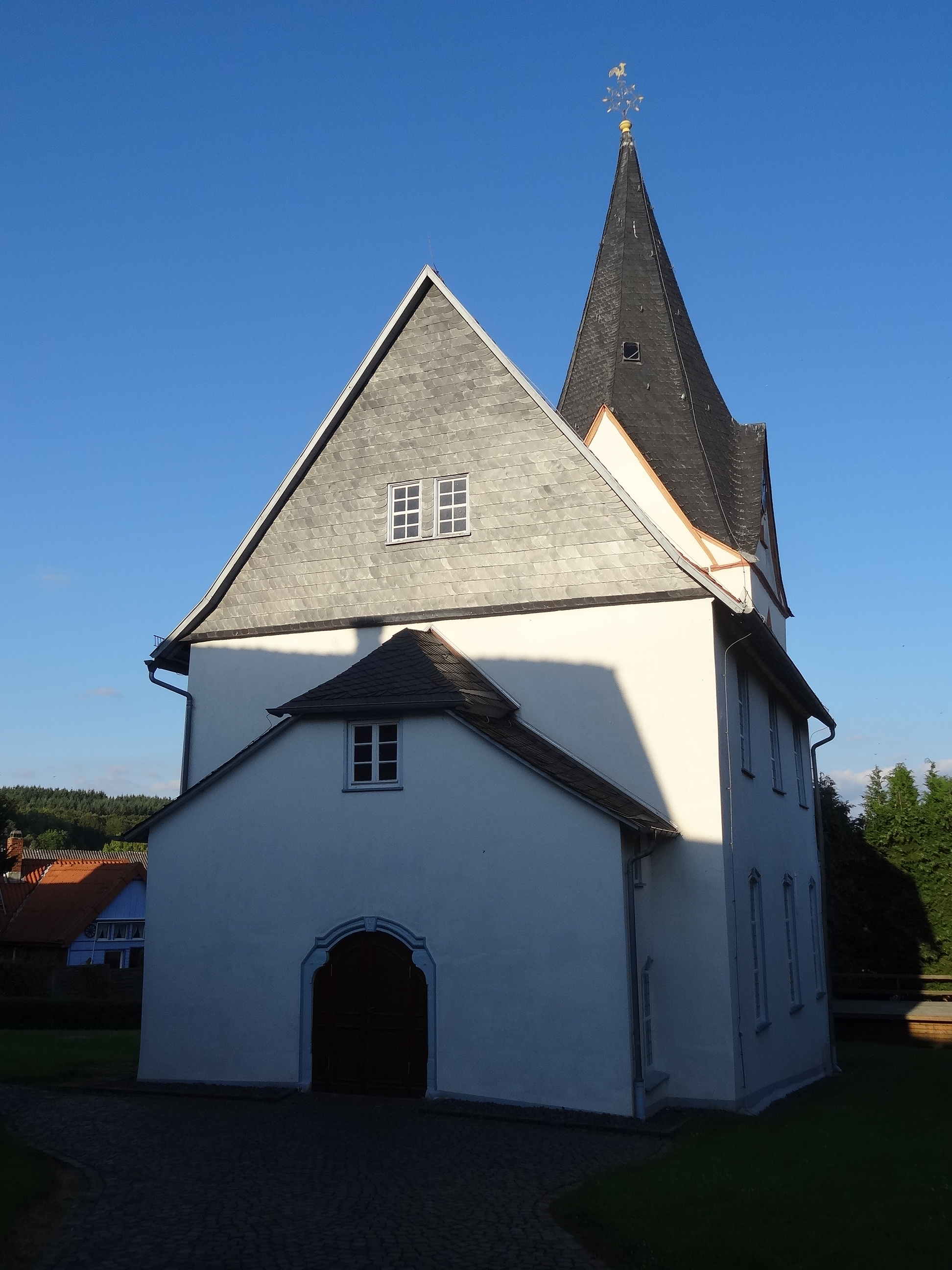 Evangelische Kirche Villingen (Hungen)